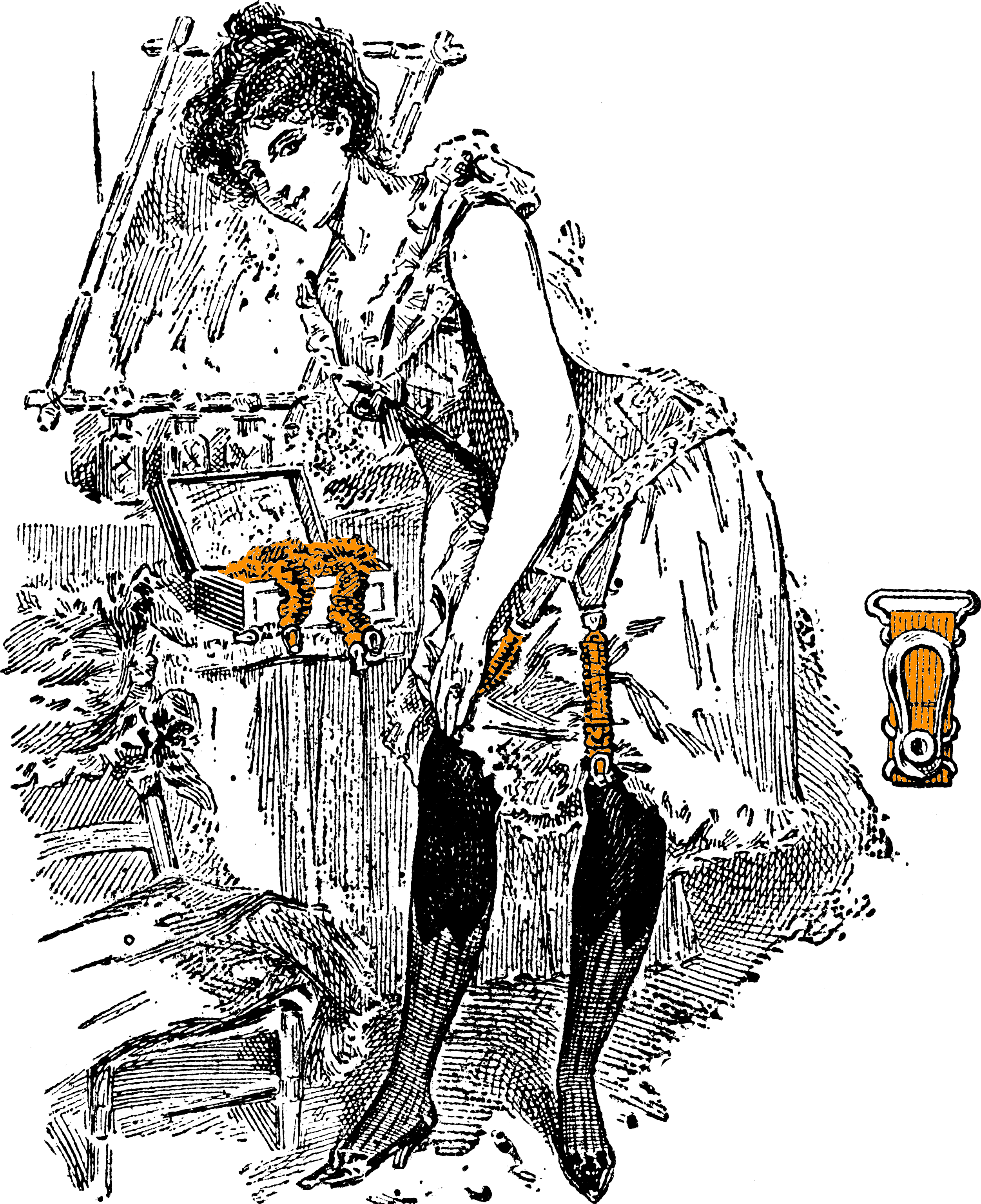 La Merveilleuse Velver Grip Nouvelle Pince Jarretelle Avec Bouton en Caoutchouc